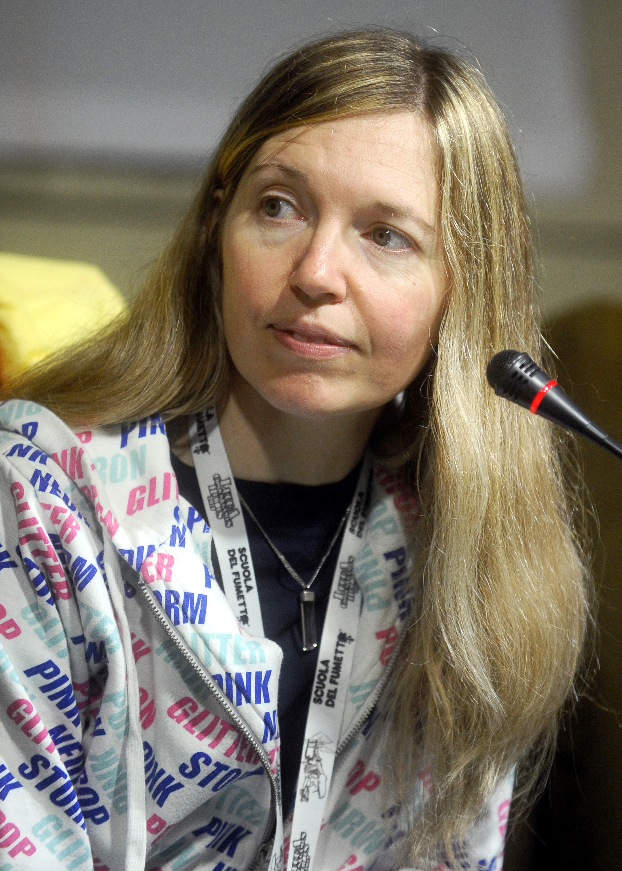 Teresa Radice. Sala Tobino. Palazzo Ducale.